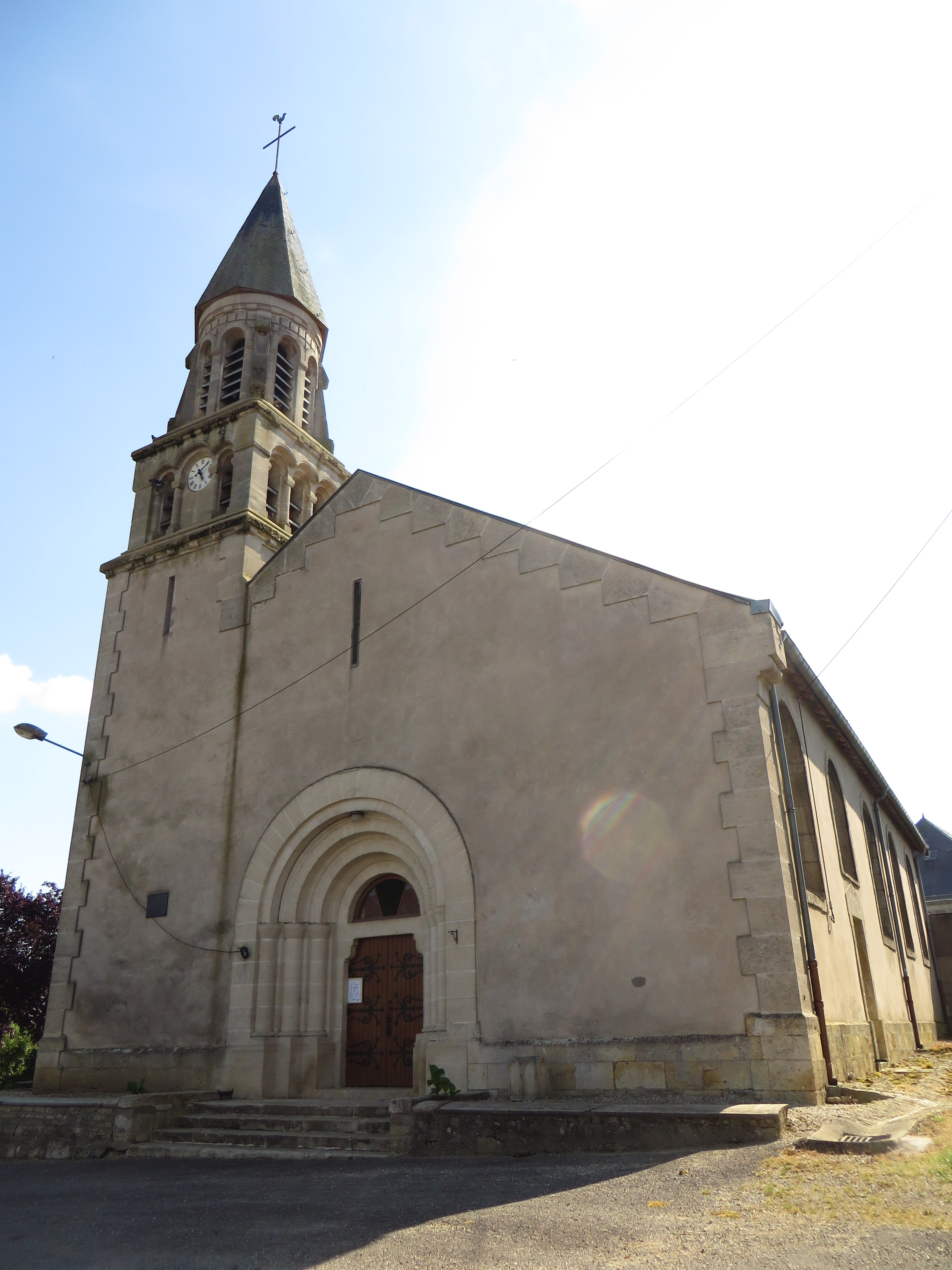 Dannevoux Église Saint-Hippolyte